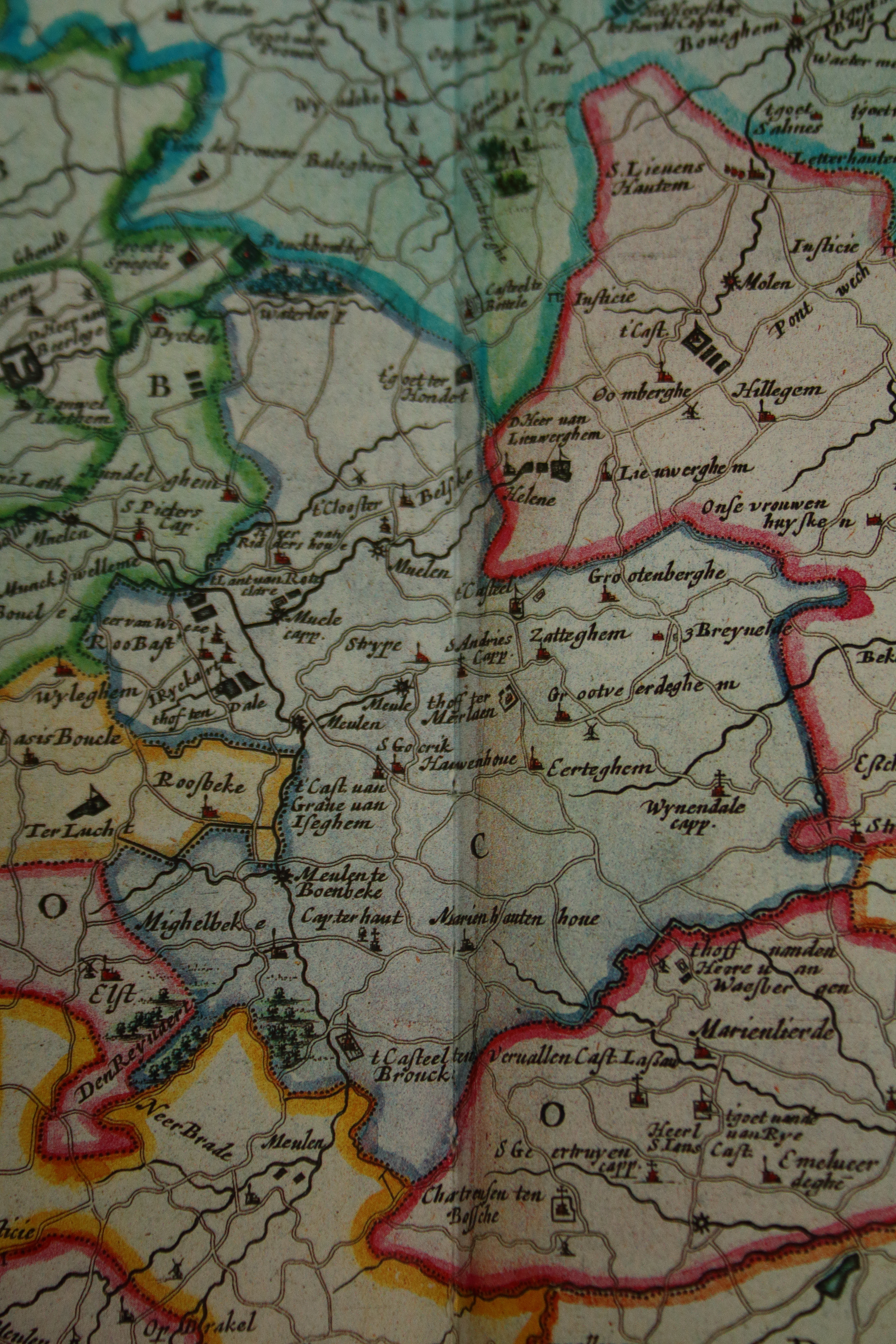 Land van Zottegem, Atlas Maior, Joan Blaeu, 1665.